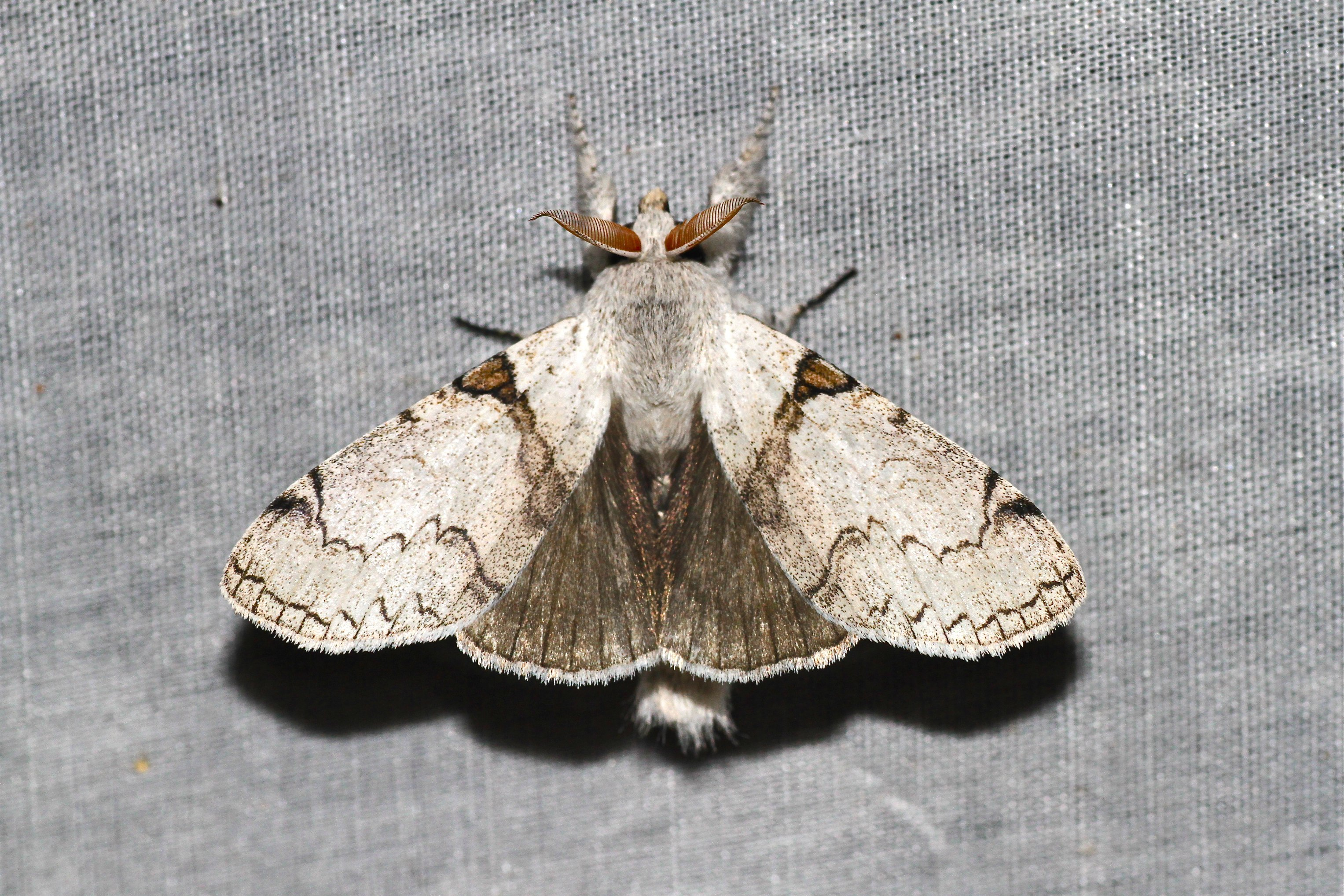 Borneo, Trusmadi area, 1150 m